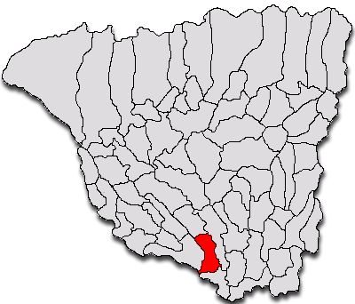 Categorie:Hărţi ale judeţului Gorj